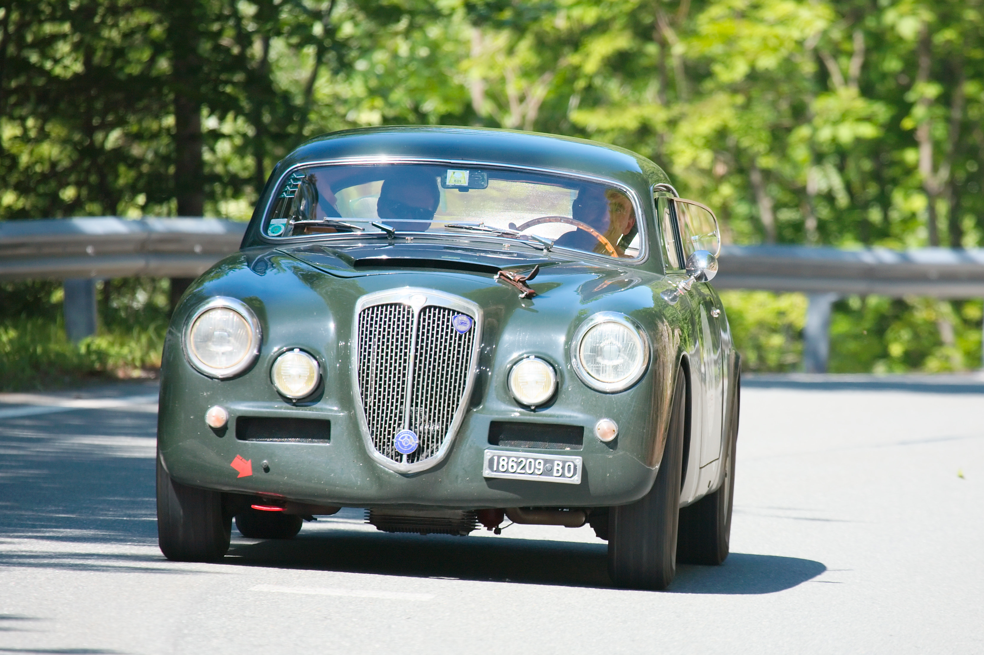 Lancia Aurelia B20 GT at Gaisbergrennen 2009